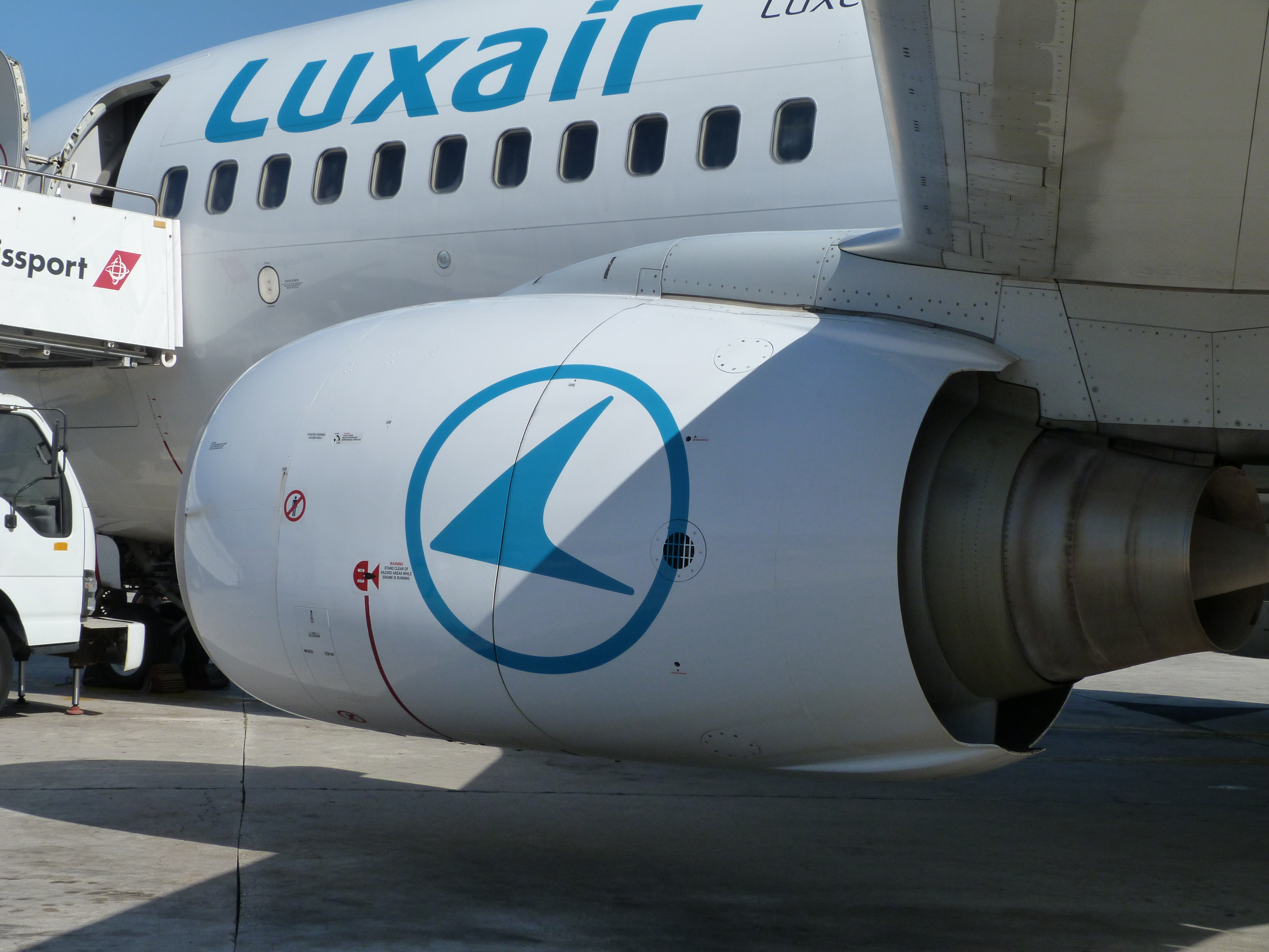 Boeing 737-700 (moteurs)